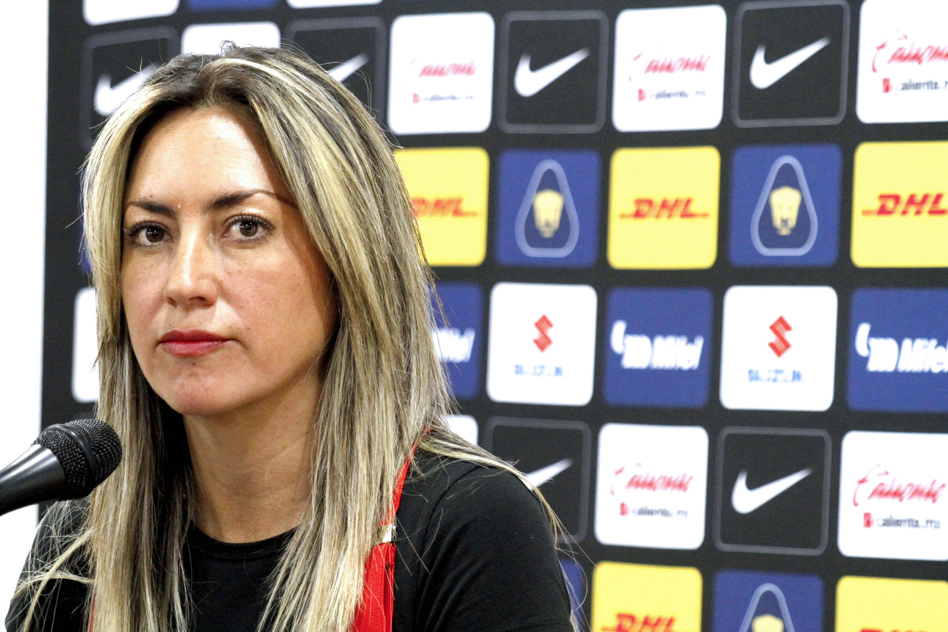 Sábado 14 de marzo de 2020 Como parte de las actividades de Tiempo de Mujeres. Festival por la Igualdad, se realizó, en el Estadio Olímpico de Ciudad Universitaria, el primer partido de la Liga Femenil MX entre los equipos Pumas de la UNAM y Cruz Azul. Fotografía: Maritza Ríos / Secretaría de Cultura de la Ciudad de México